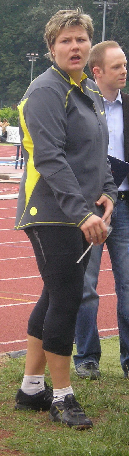 Kamila Skolimowska na Mistrzostwa Polski seniorów w lekkiej atletyce - Poznań 2007